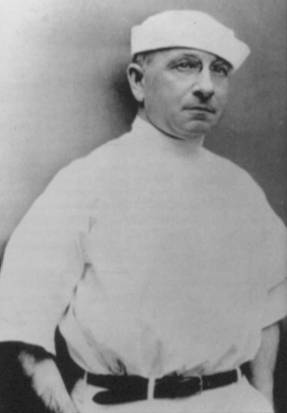 Alexis Carrel nositel Nobelovy ceny 1912